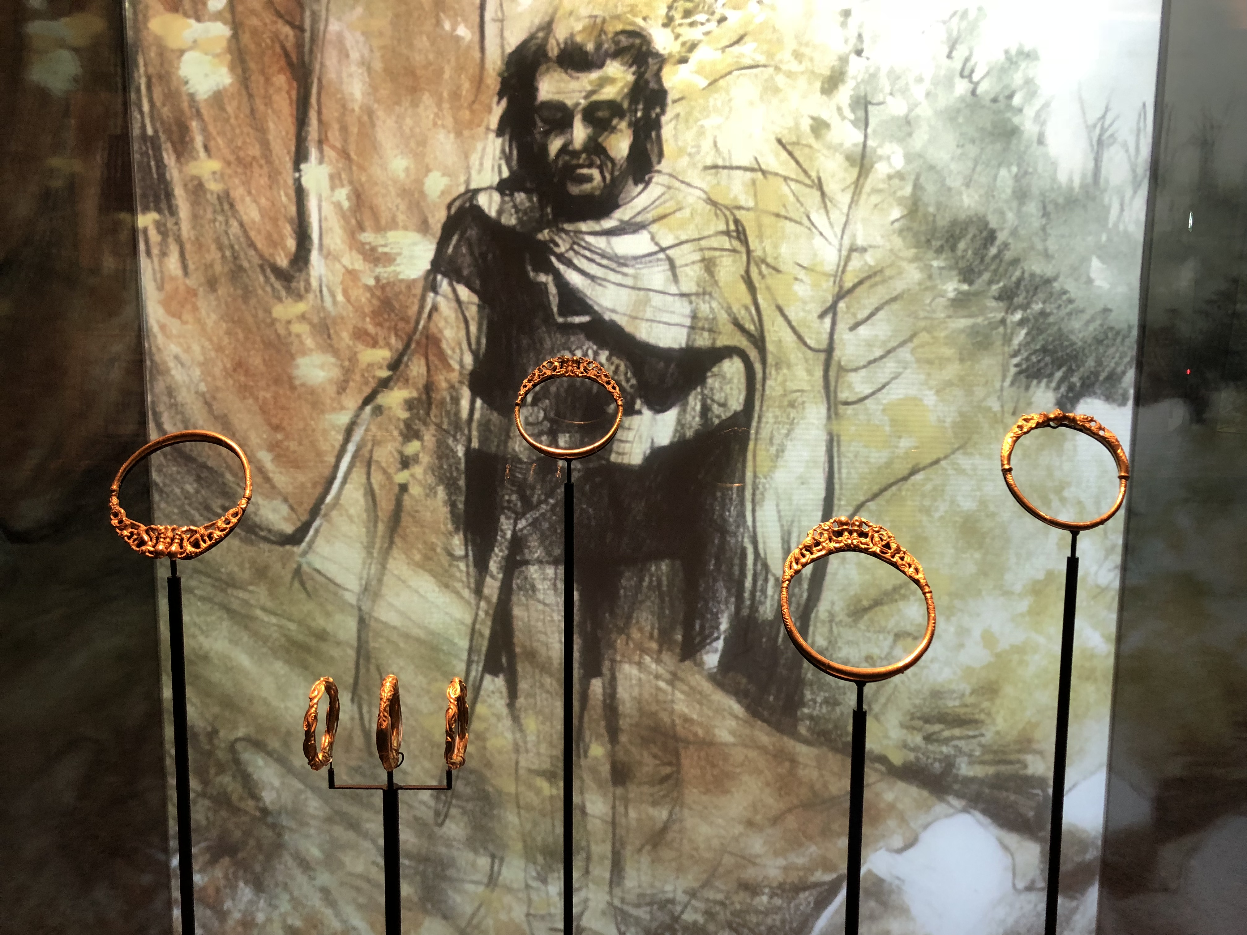 Goldschatz von Erstfeld Präsentierung im Landesmuseum Zürich